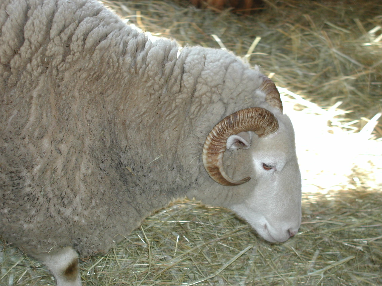 Ram: Sturbridge, Massachusetts, 2001